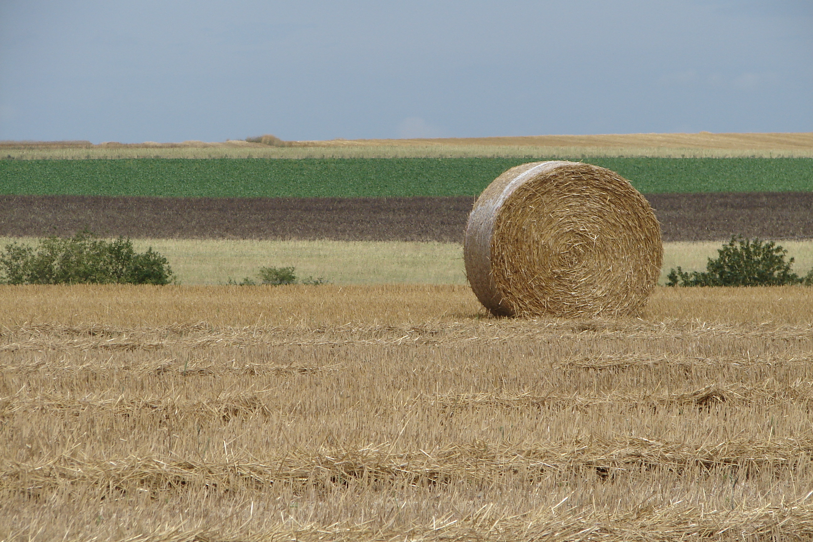 Lieu : Proix (Guise / Aisne / Picardie / France) – Bottes de paille, chaume dans les champs.